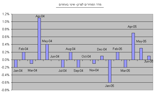 הקובץ נוצר על ידי (Hbk3) ואני מותיר לכל אחד להשתמש בו.